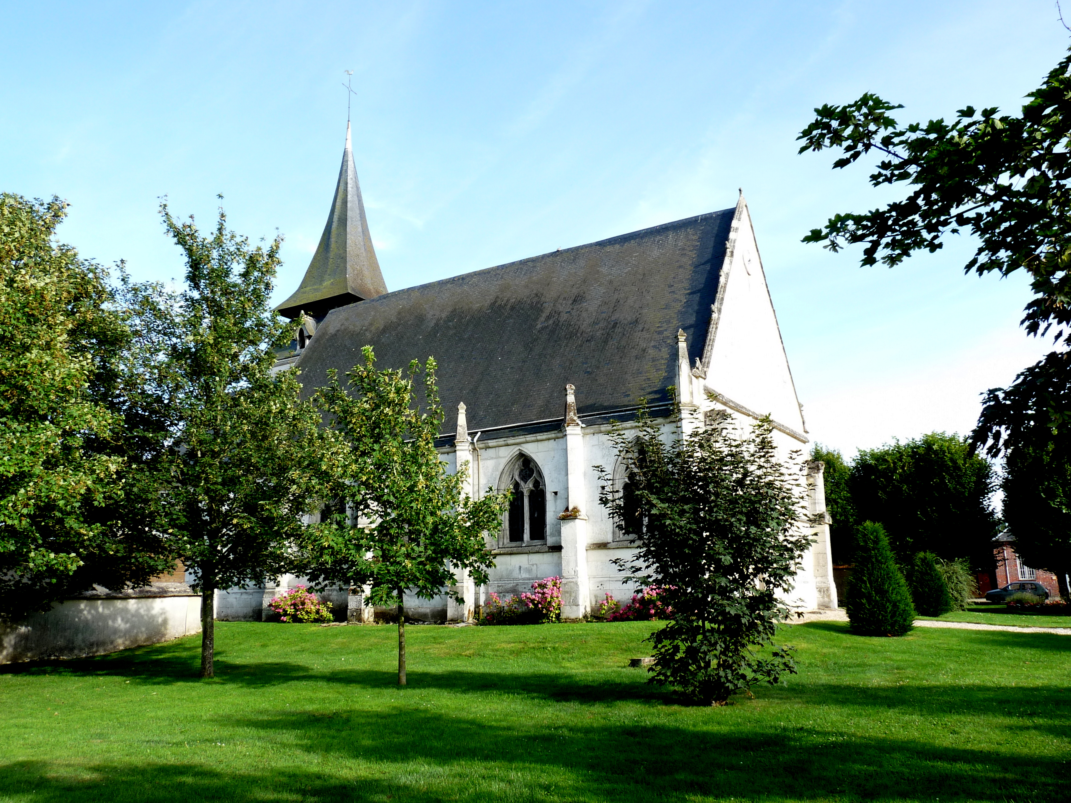 Église Saint-Martin de Claville